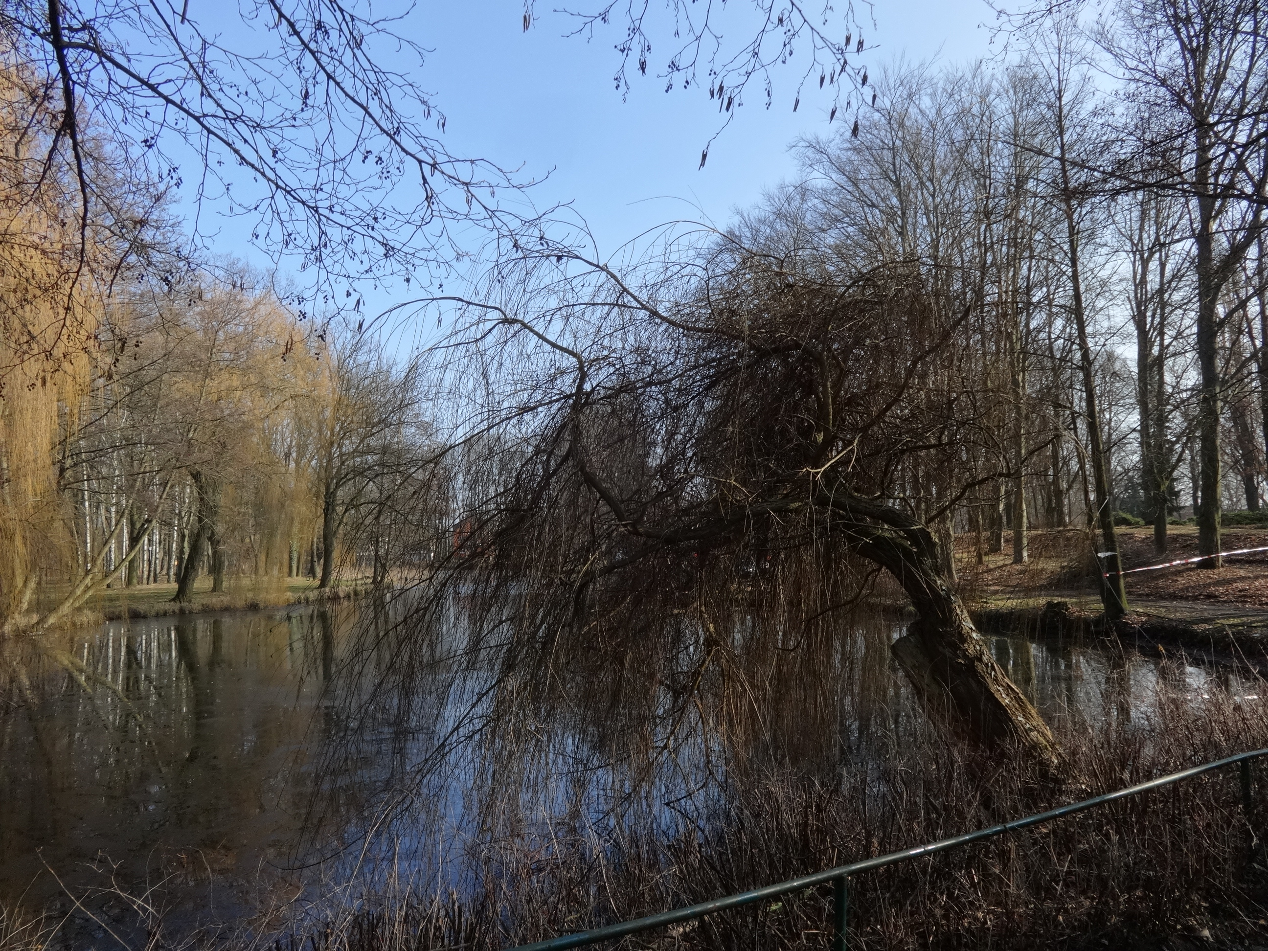 Der Schlosspark befindet sich im nordwestlichen Teil außerhalb der Altstadt von Jüterbog. Sein Name geht auf eine mittelalterliche Burg zurück, die heute nicht mehr vorhanden ist.